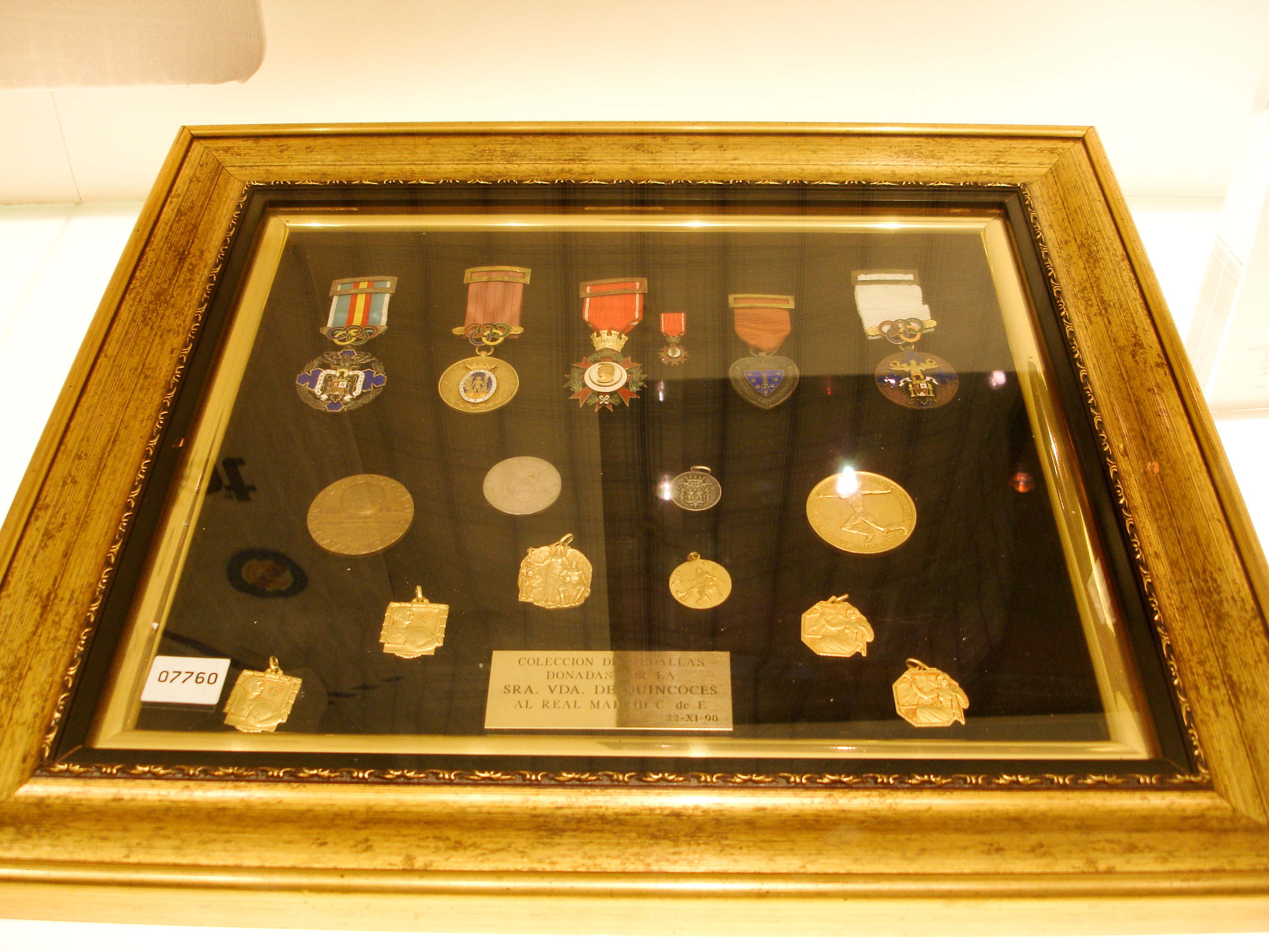 Club memorabilia